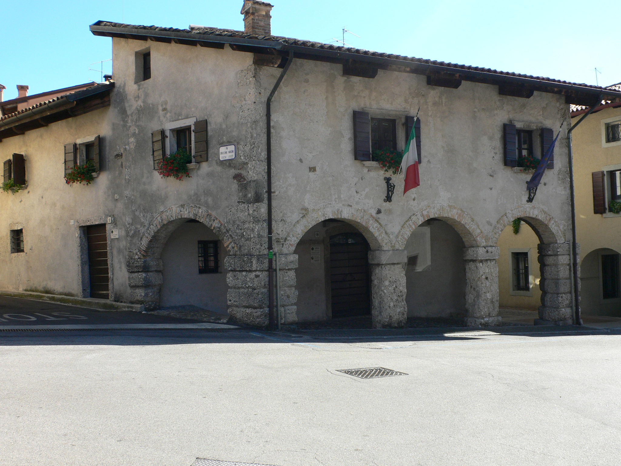 San Daniele del Friuli - Casa del '300